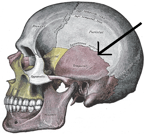 módosítva